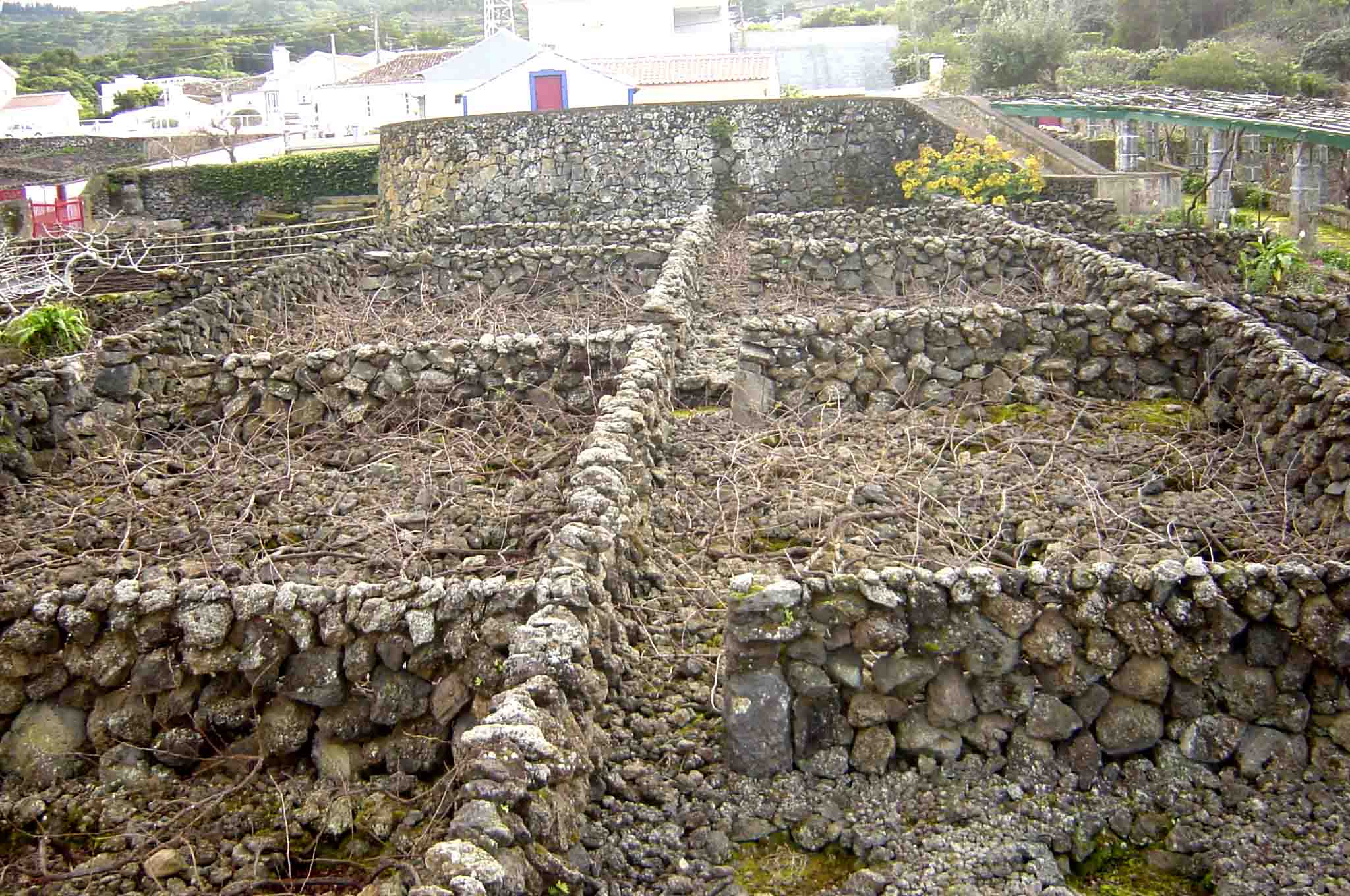 Curraletas de protecção do Vinho dos Biscoitos, com as vinhas em época de Inverno, ilha Terceira, Açores, Portugal